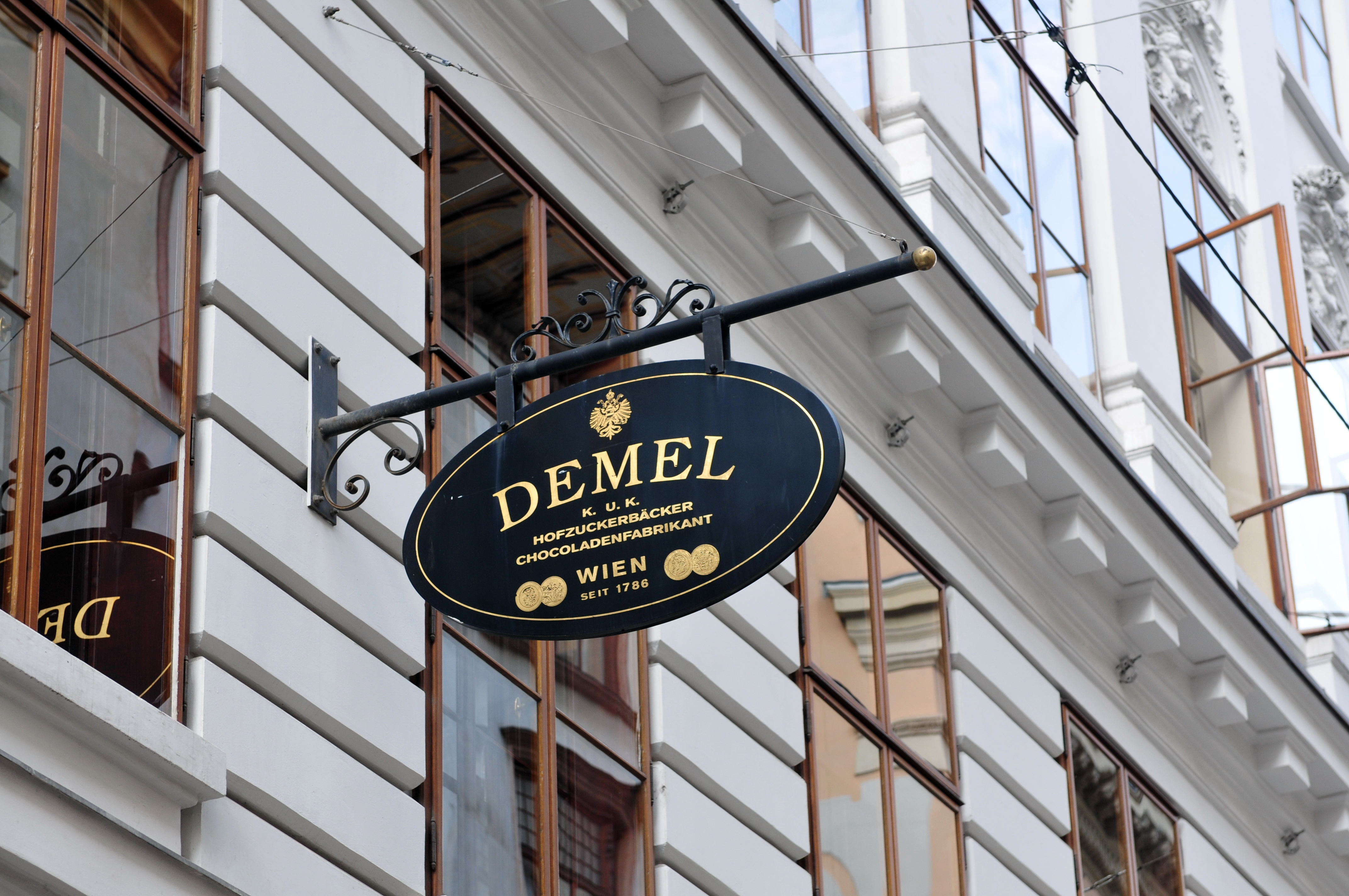 Treffen der Redaktion Essen und Trinken ion Wien